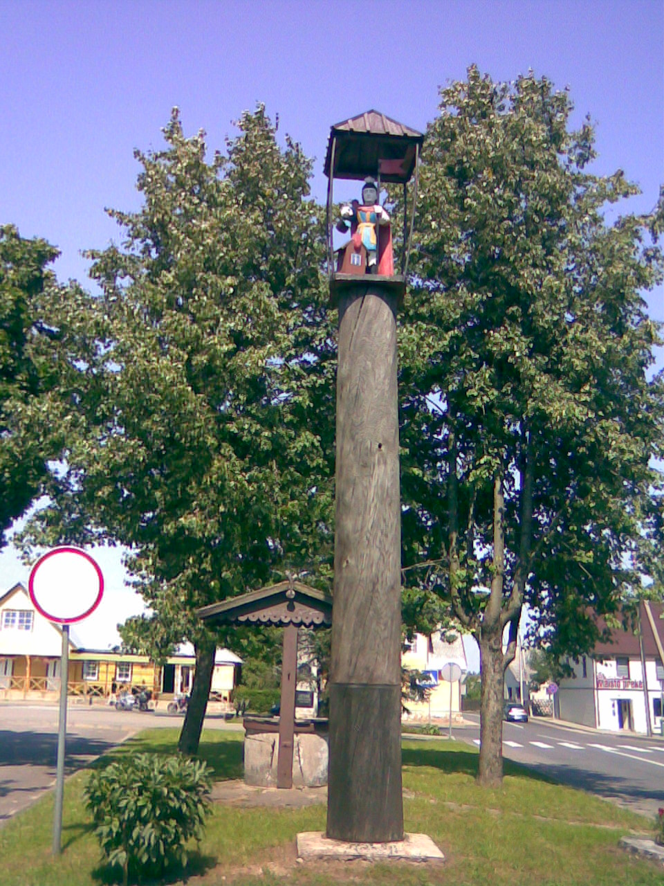 Žemaitėška: Plateliū miestelie esonti Fluorėjuona statola.